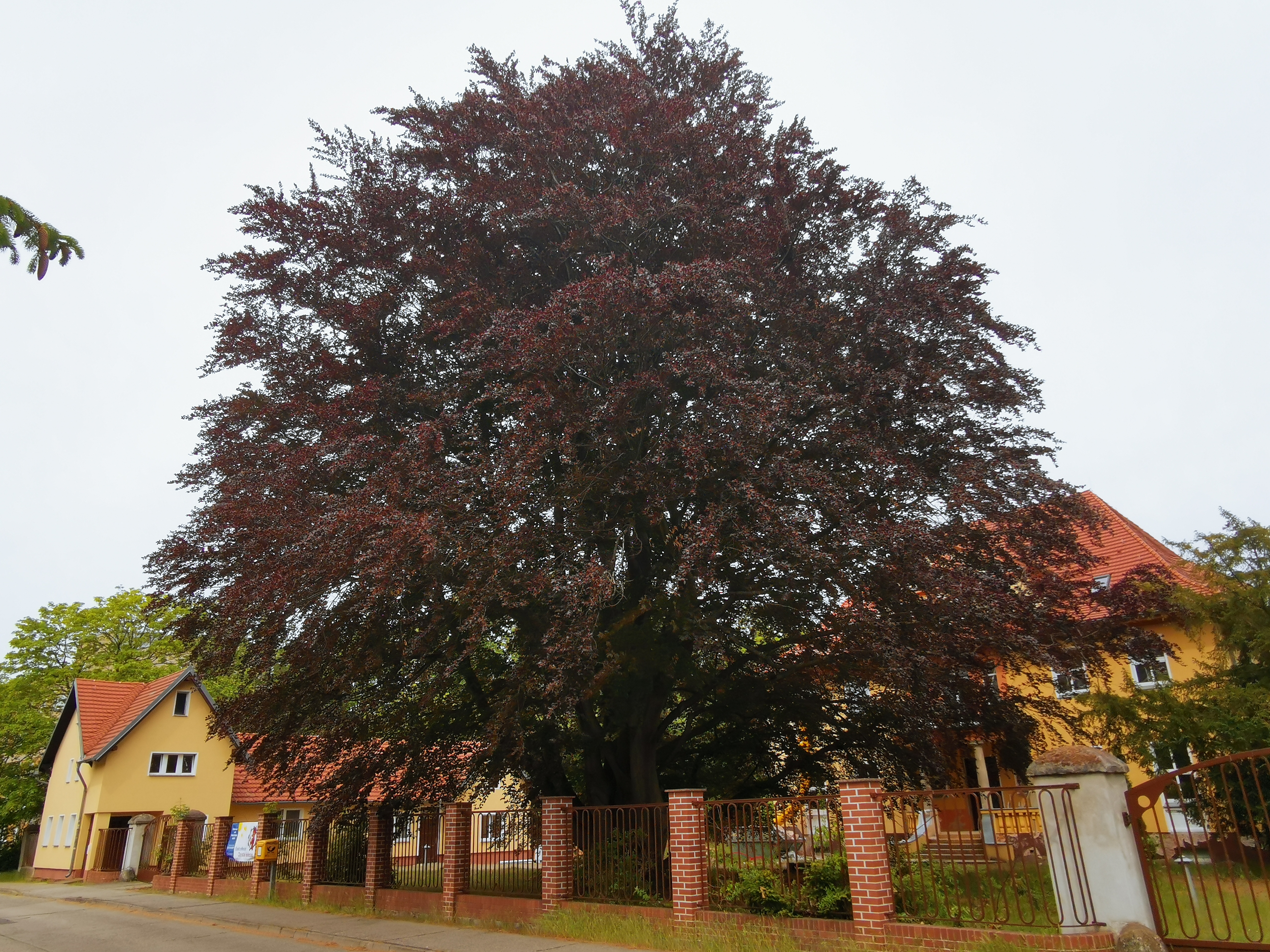 Als Naturdenkmal geschützte Blutbuche Schomberg 1 in Spremberg